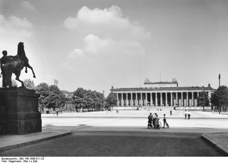 Berlin; Lustgarten und Altes Museum